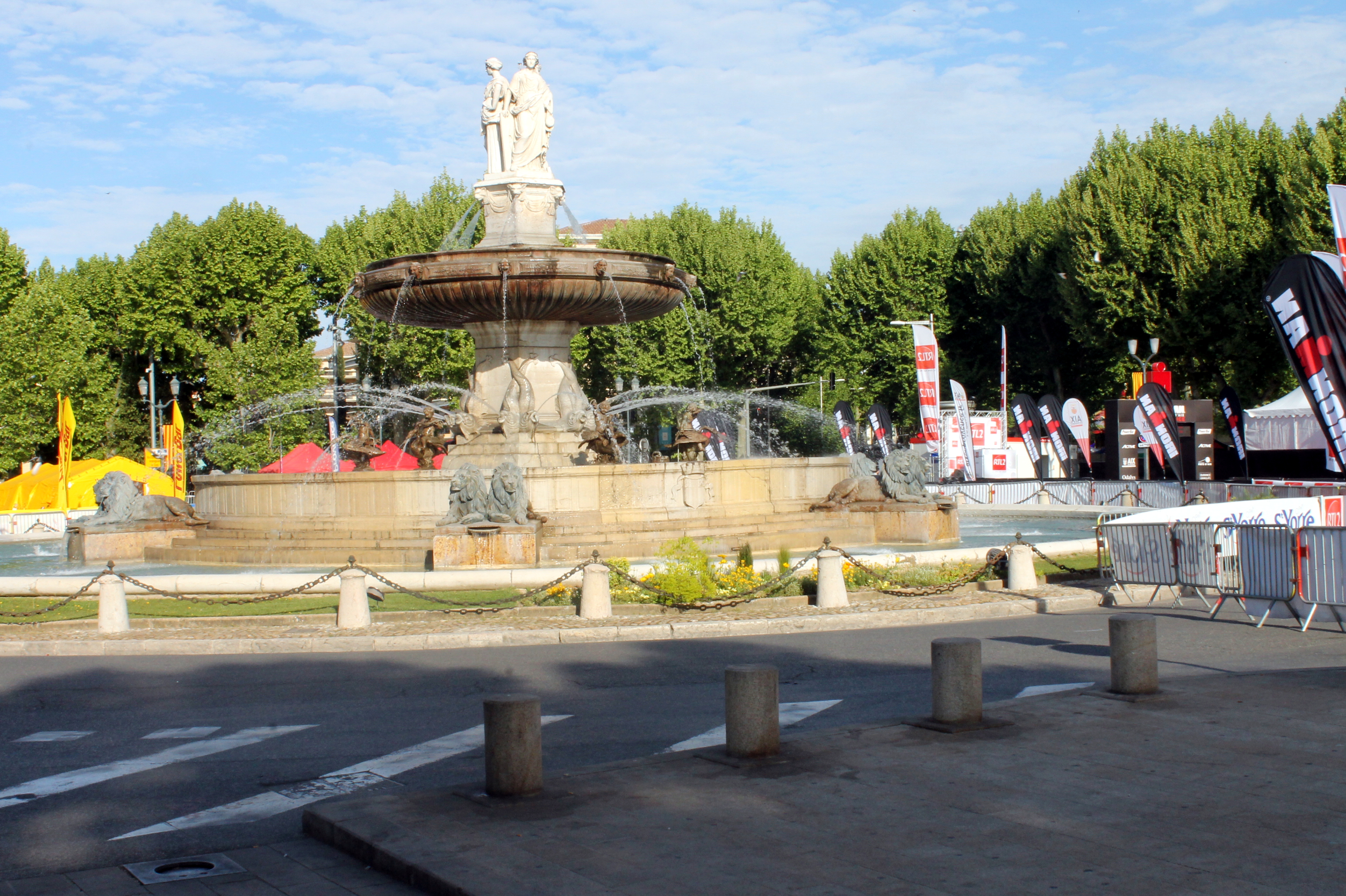 Place de la Rotonde Ironman Pays d'Aix 2015